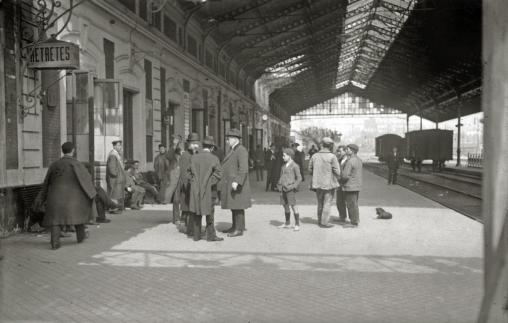 Título original: Anden de la estación del Norte (1/1) Localización: San Sebastián (Guipúzcoa)